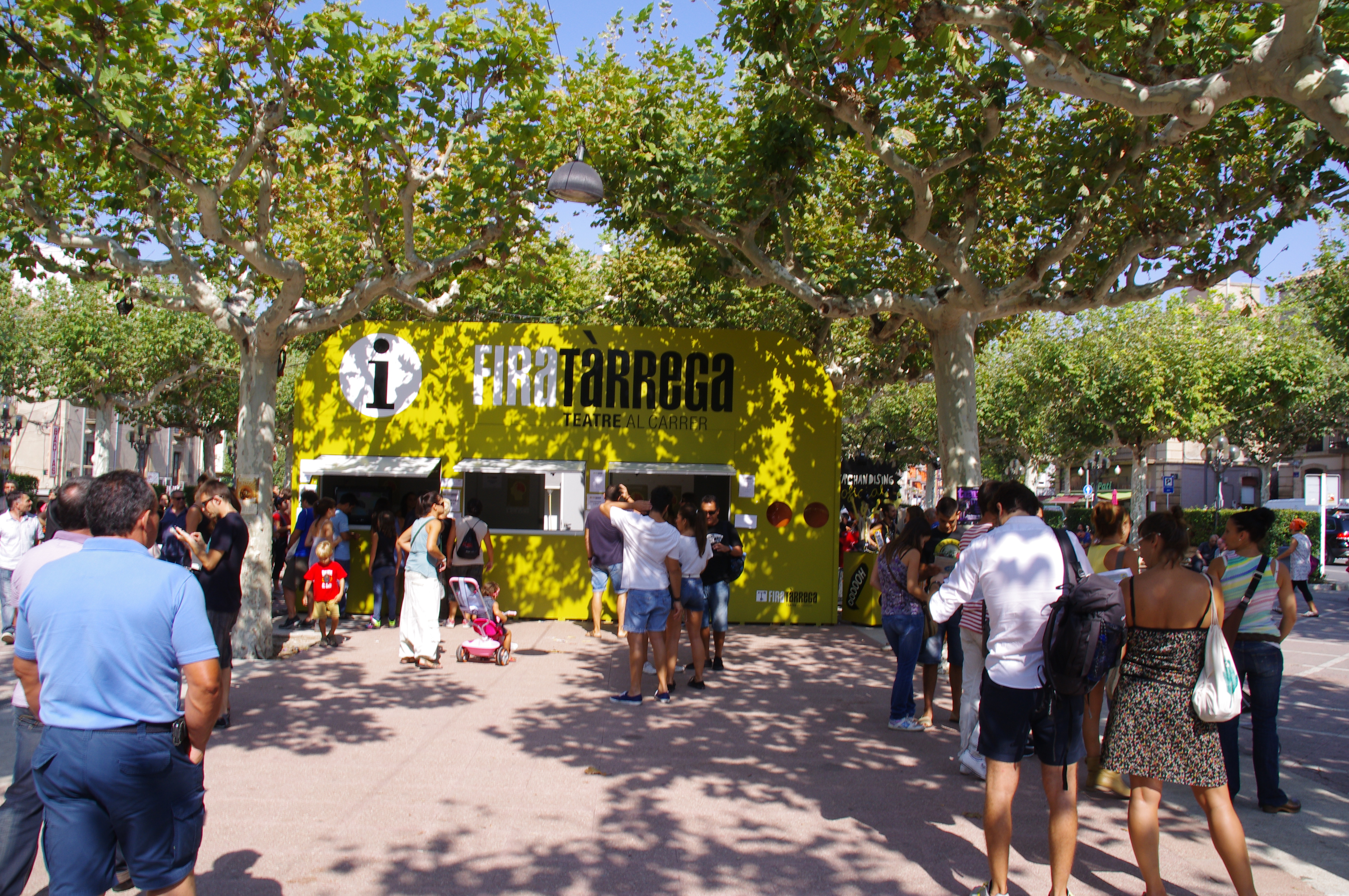 Estand d'informació de FiraTàrrega 2012 a la plaça del Carme de Tàrrega